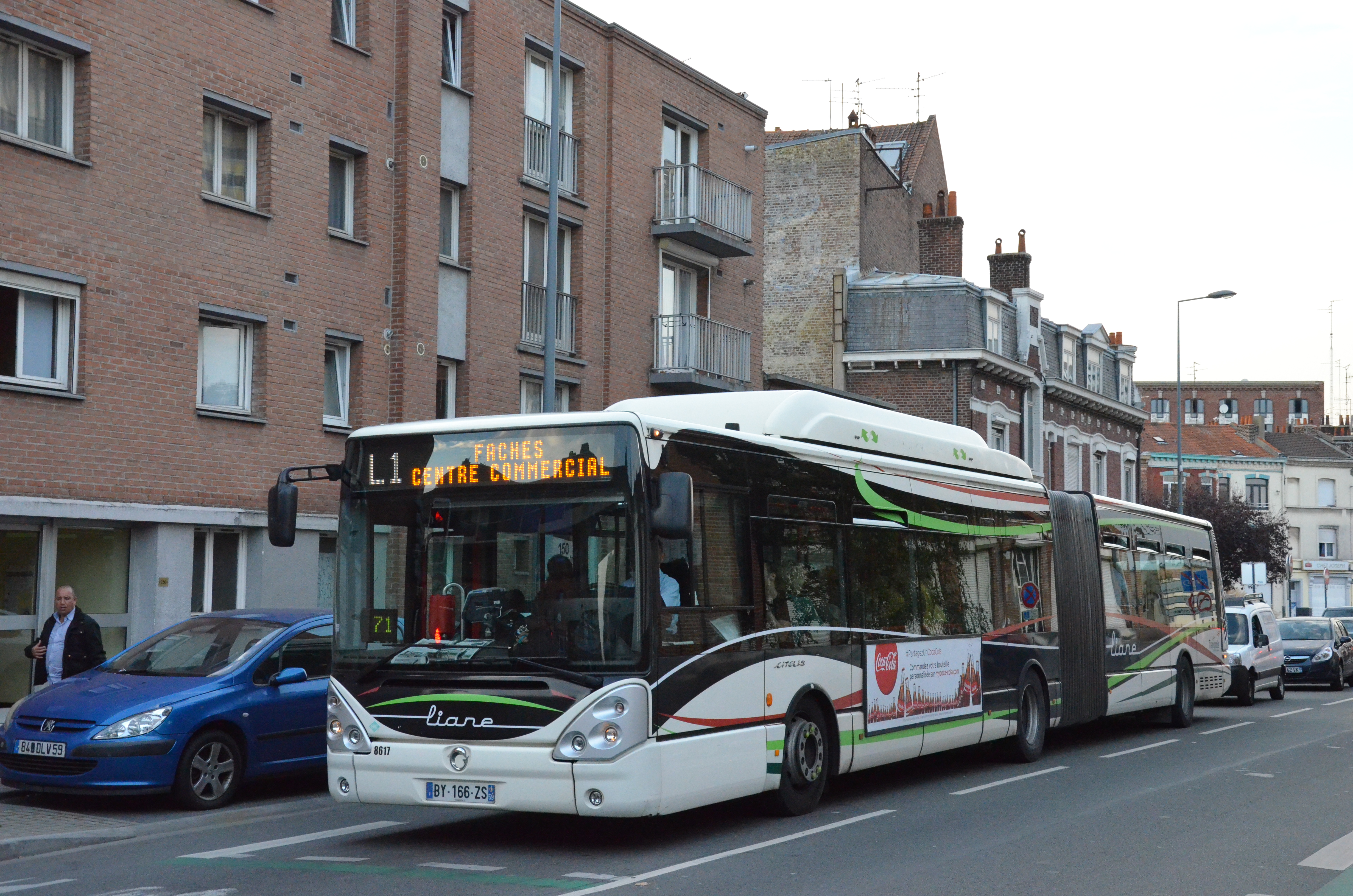 Irisbus Citelis 18 n°8617 à la Porte de Douai, sur le réseau Transpole de Lille.